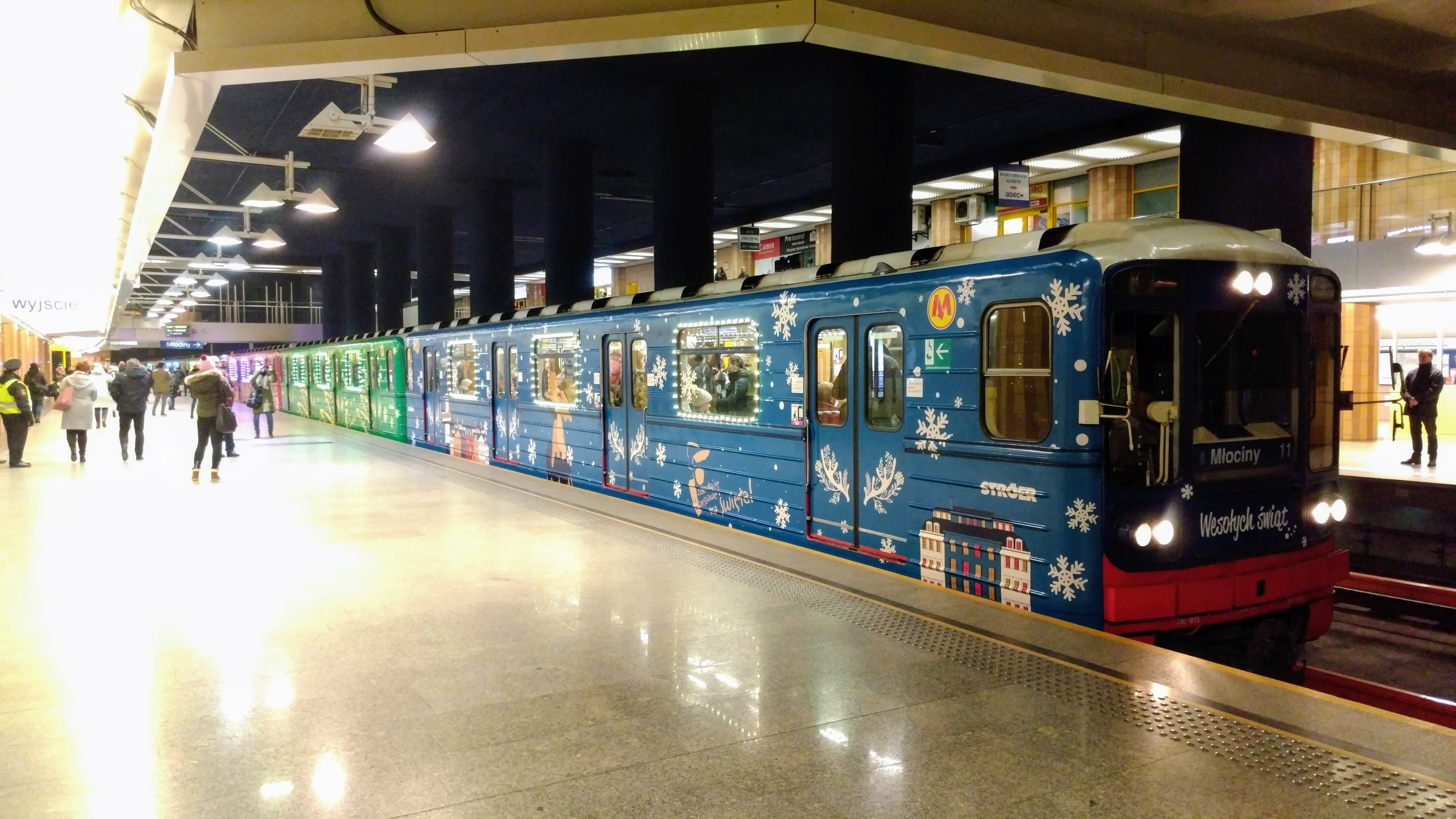 "Świąteczny" skład metra nr 11 na stacji Centrum